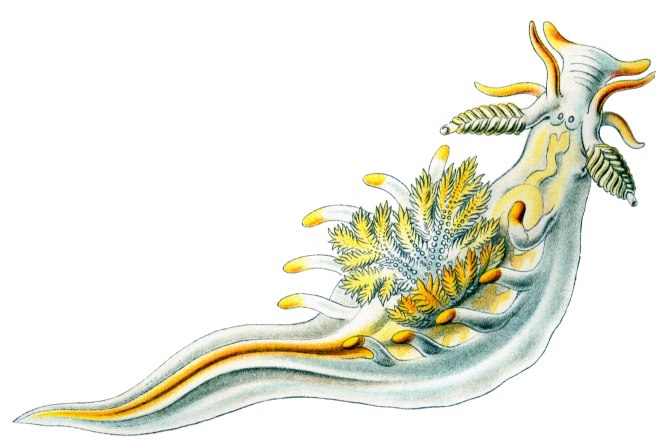 Ancula cristata (Lovén) = Ancula gibbosa (Risso, 1818)